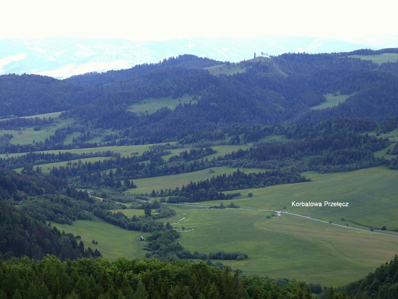 Korbalowa Przełęcz i Magura Spiska. Widok z Wysokich Skałek